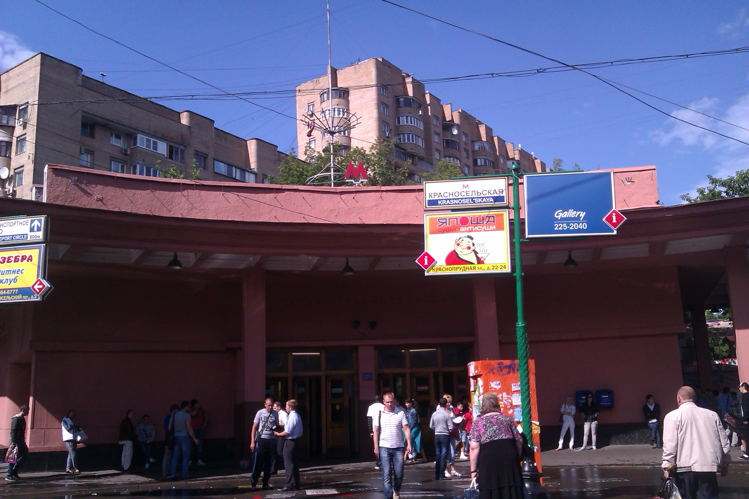 Наземный и единственный вестибюль станции метро "Красносельская"